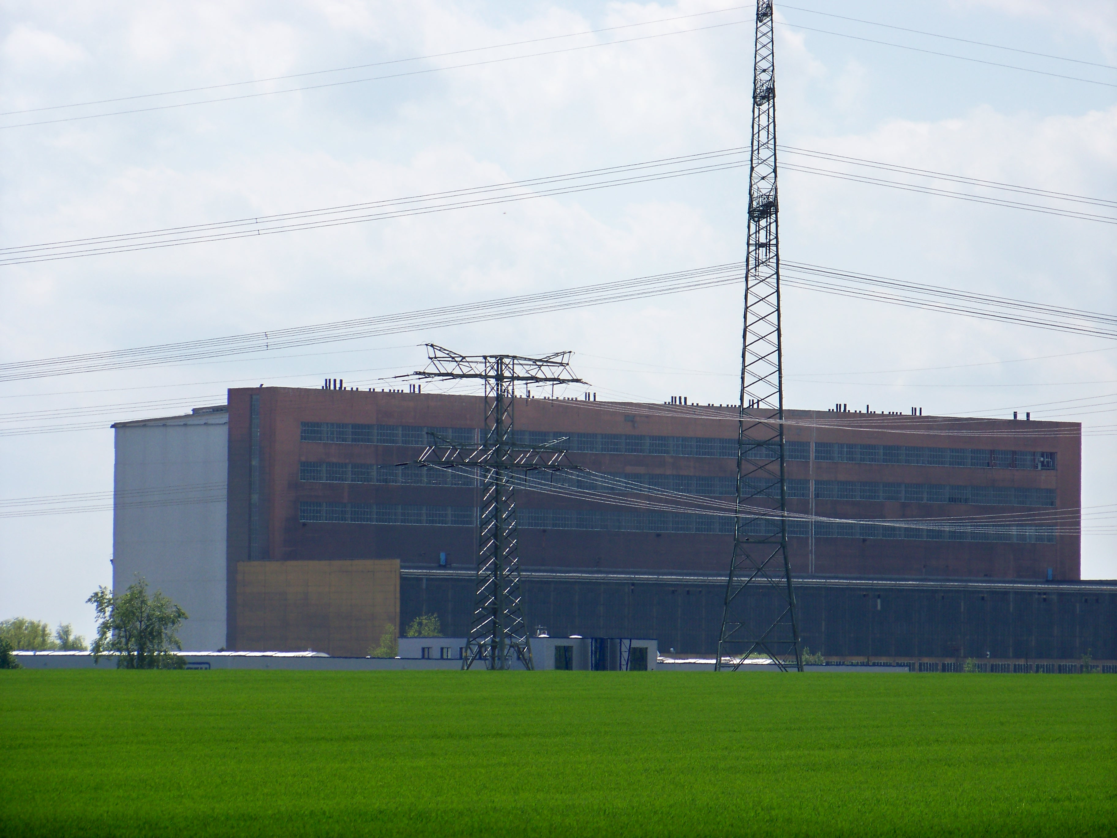 Kraftwerk Thierbach von Thierbach/Sachsen/Landkreis Leipziger Land aus gesehen